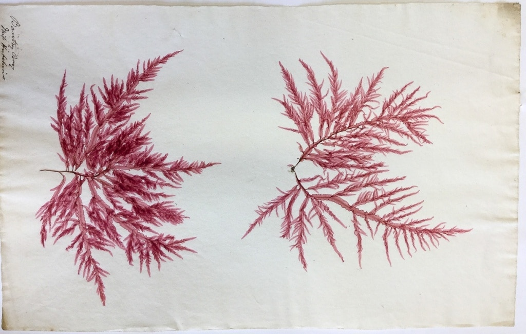 Probe von Meeresalgen, Ellen Hutchins (1785-1815)